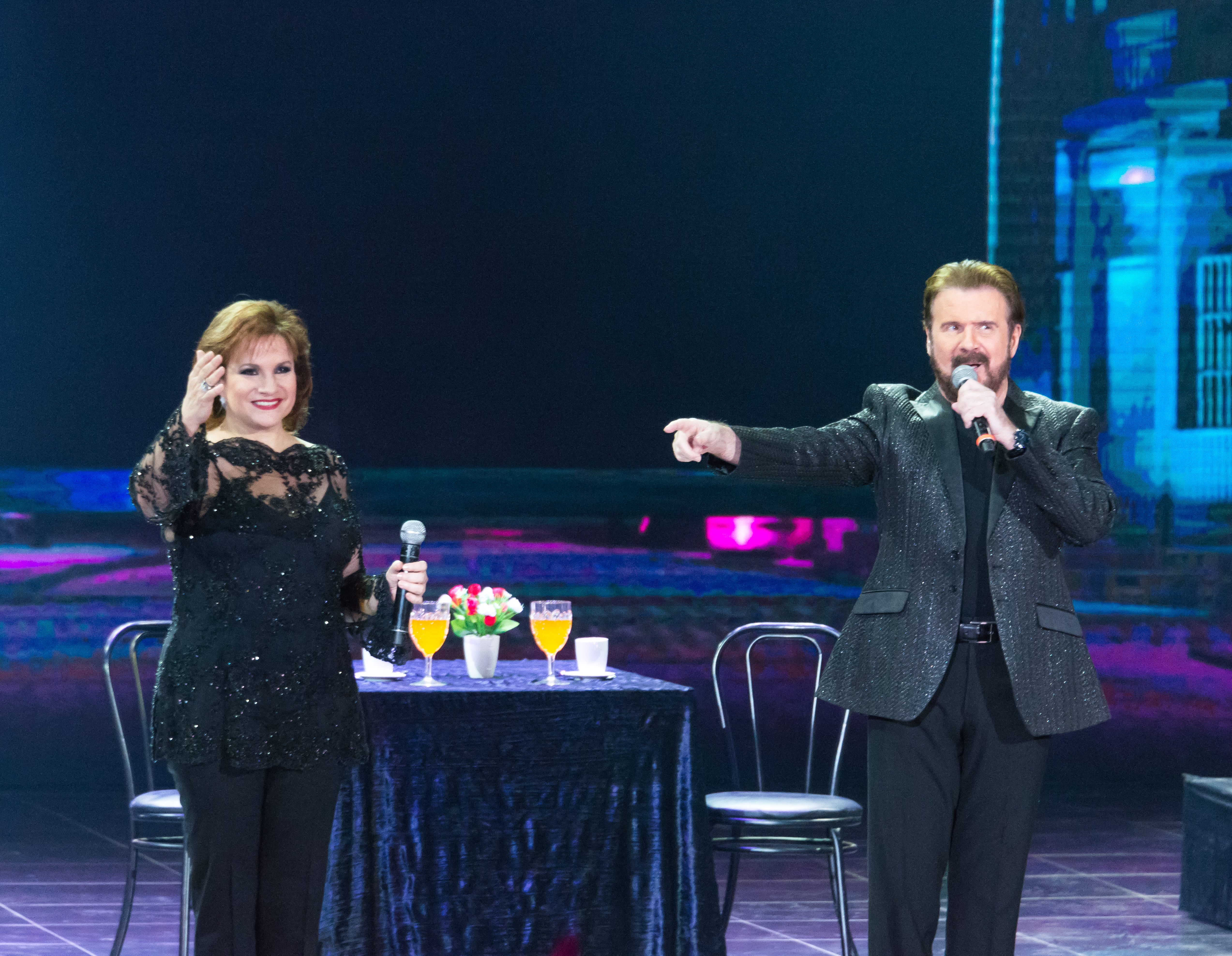 Pimpinela, Festival del Huaso de Olmué, Parque El Patagual, Olmué, Región de Valparaíso, Chile.